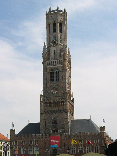 het Belfort van Brugge (België)